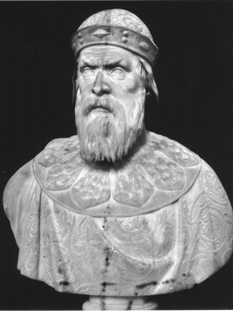 Busto di Angelo Partecipazio, opera di Pietro Lorandini (1860-1861). Il busto fa parte del Panteon Veneto, conservato presso Palazzo Loredan di Campo Santo Stefano a Venezia.